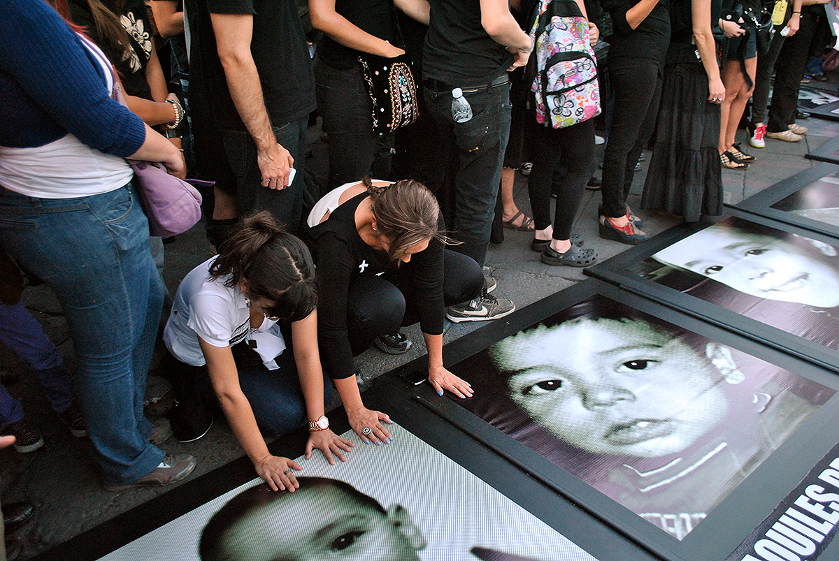 Manifestación por el Incendio en la Guarderia ABC. Plaza de la Constitución de la Ciudad de México.